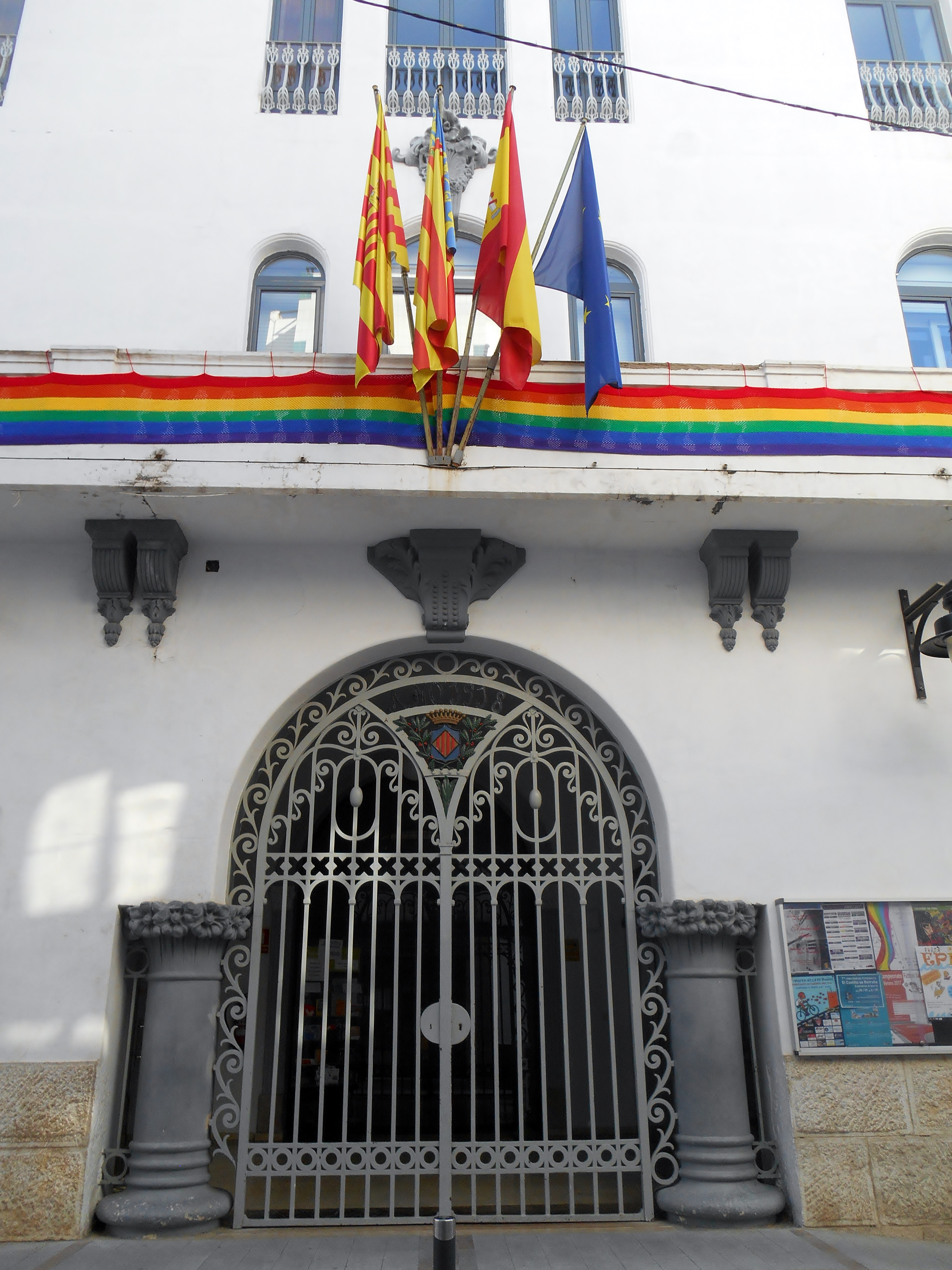 Bunyol.